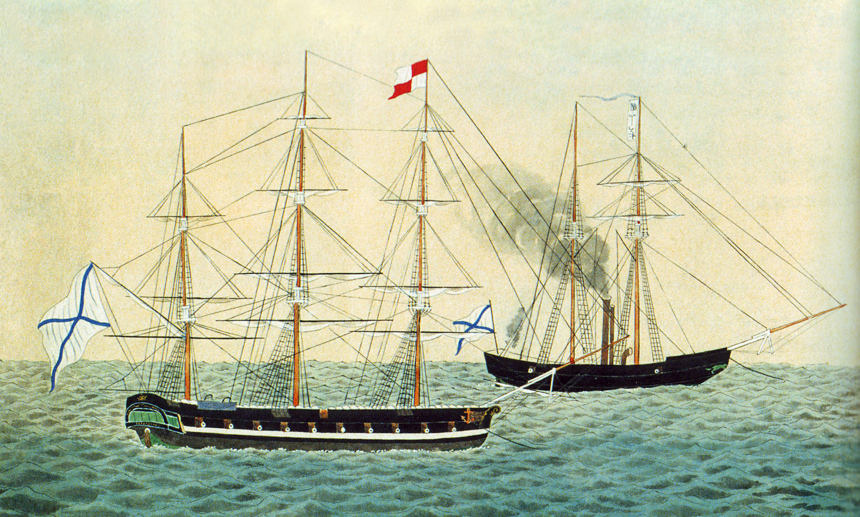 Корвет «Оливуца» и шхуна «Восток» в составе эскадры графа Е. В. Путятина на рейде Нагасаки, 10 августа 1853 года